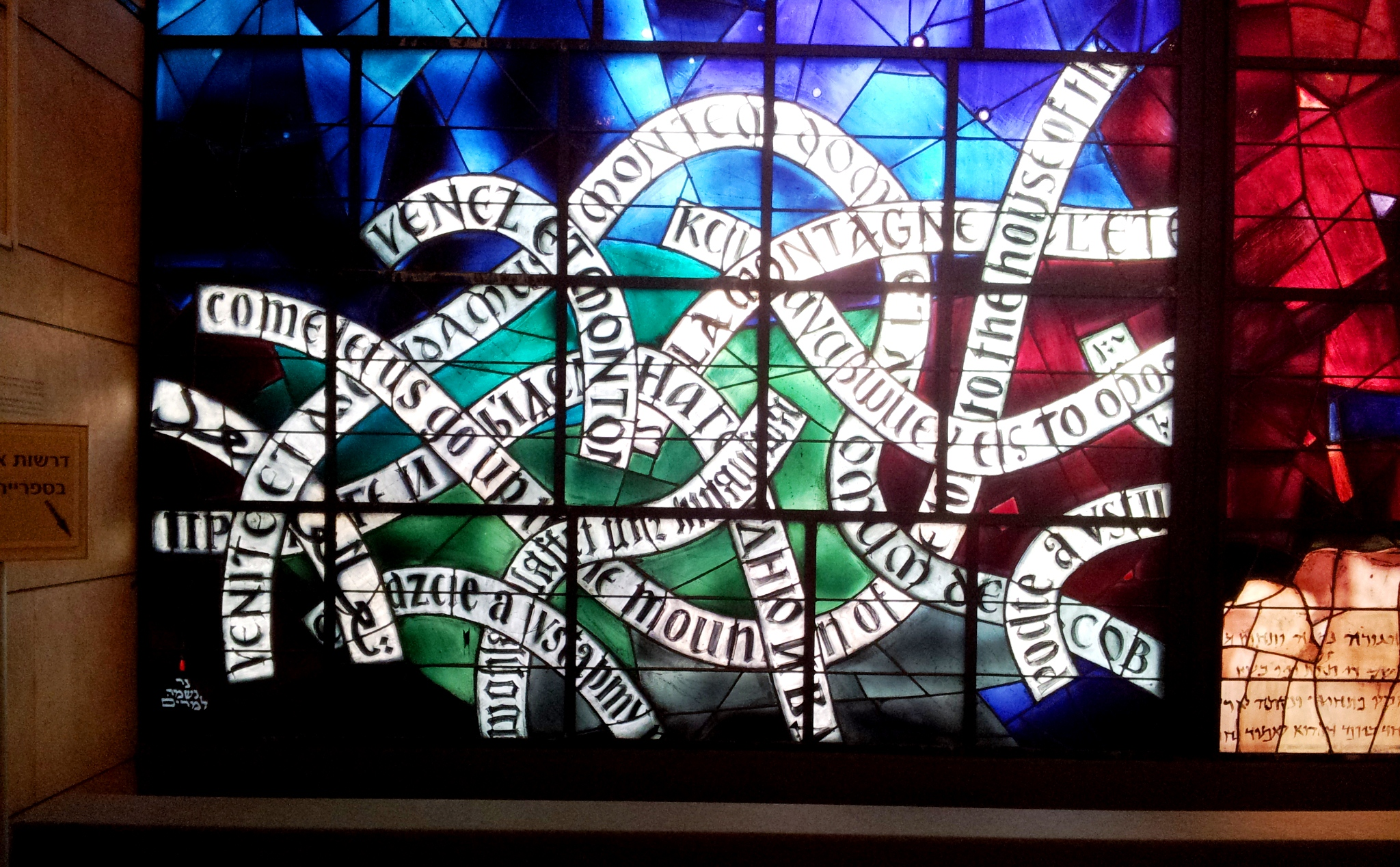 阿爾頓國家圖書館左側窗戶